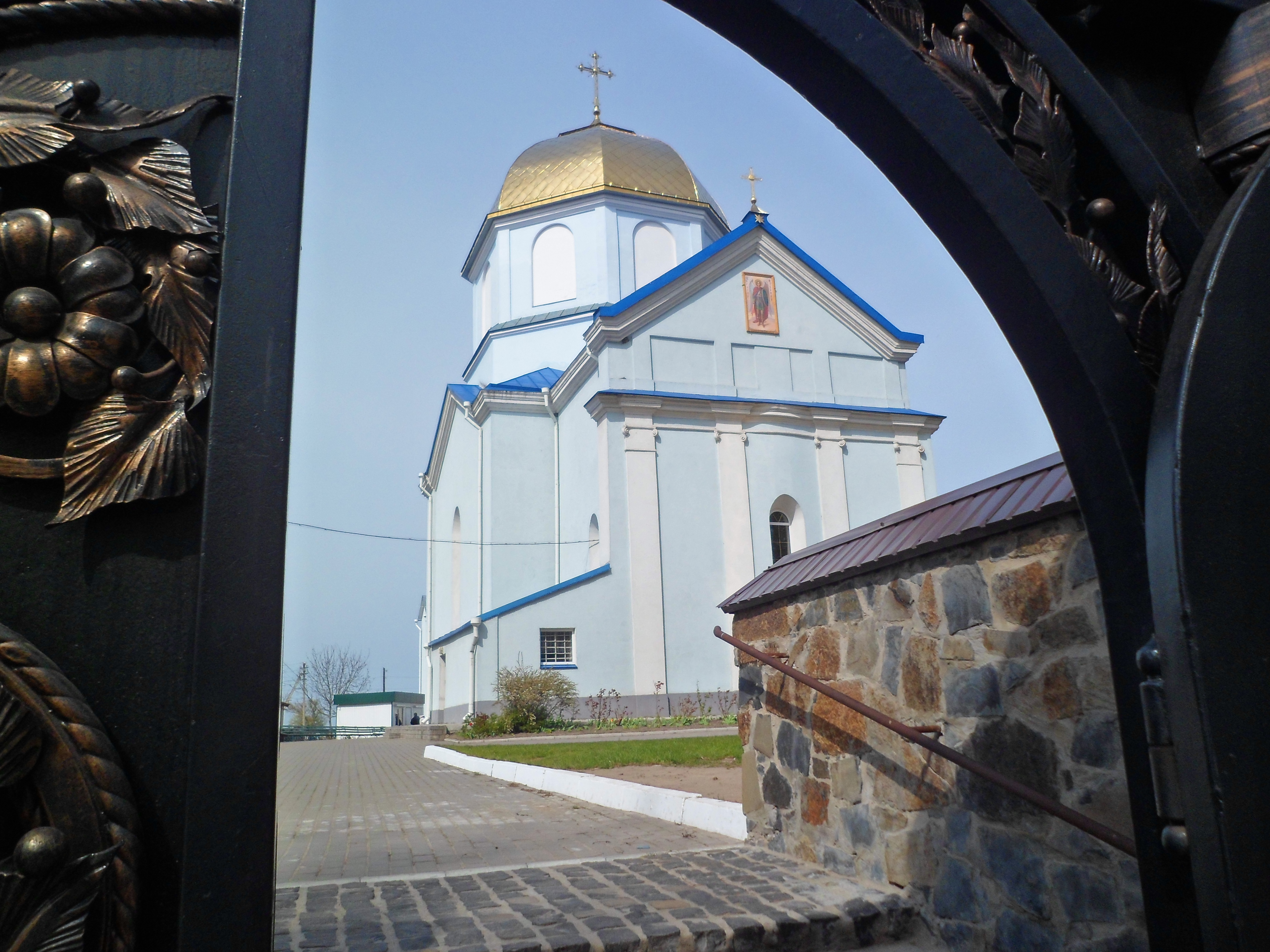 Вхід на територію церкви